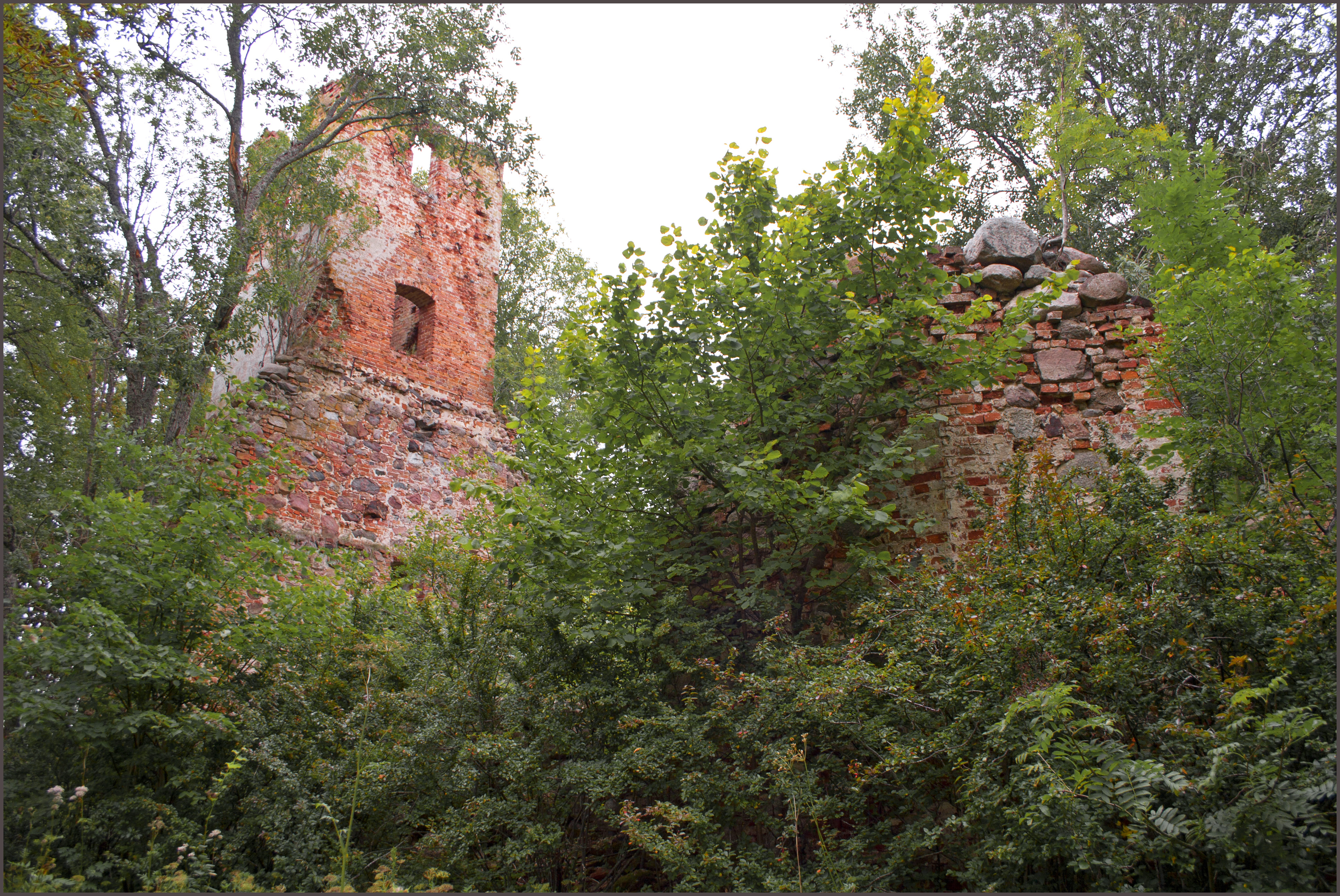 Ķērkliņi vandalized chuch